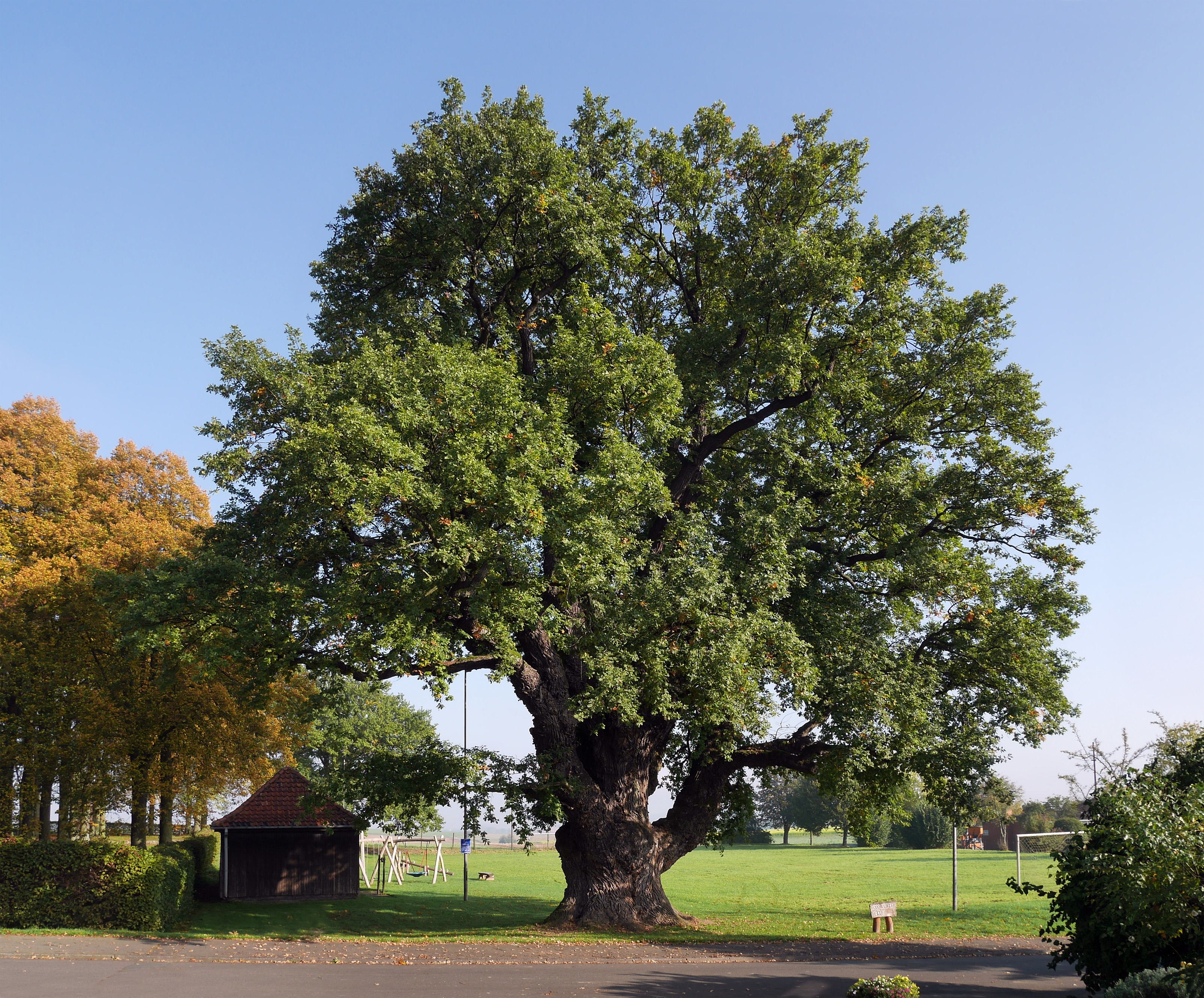 Die Gerichtseiche steht auf dem Mühlenberg in Groß Schneen im Landkreis Göttingen in Niedersachsen. Sie zählt mit einem Umfang von knapp 8 m zu den größten Eichen in Deutschland. Ihr Alter wurde im Jahre 2004 per Bohrspan ermittelt. Das Alter beträgt weniger als 300 Jahre, wird aber Umgangssprachlich als 1000-jährige bezeichnet.